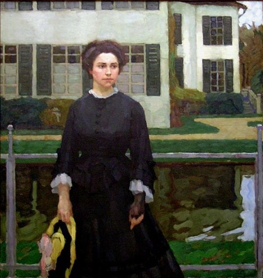 Frieda Blell vor dem Schloss Planegg (Frau Putz im Garten)